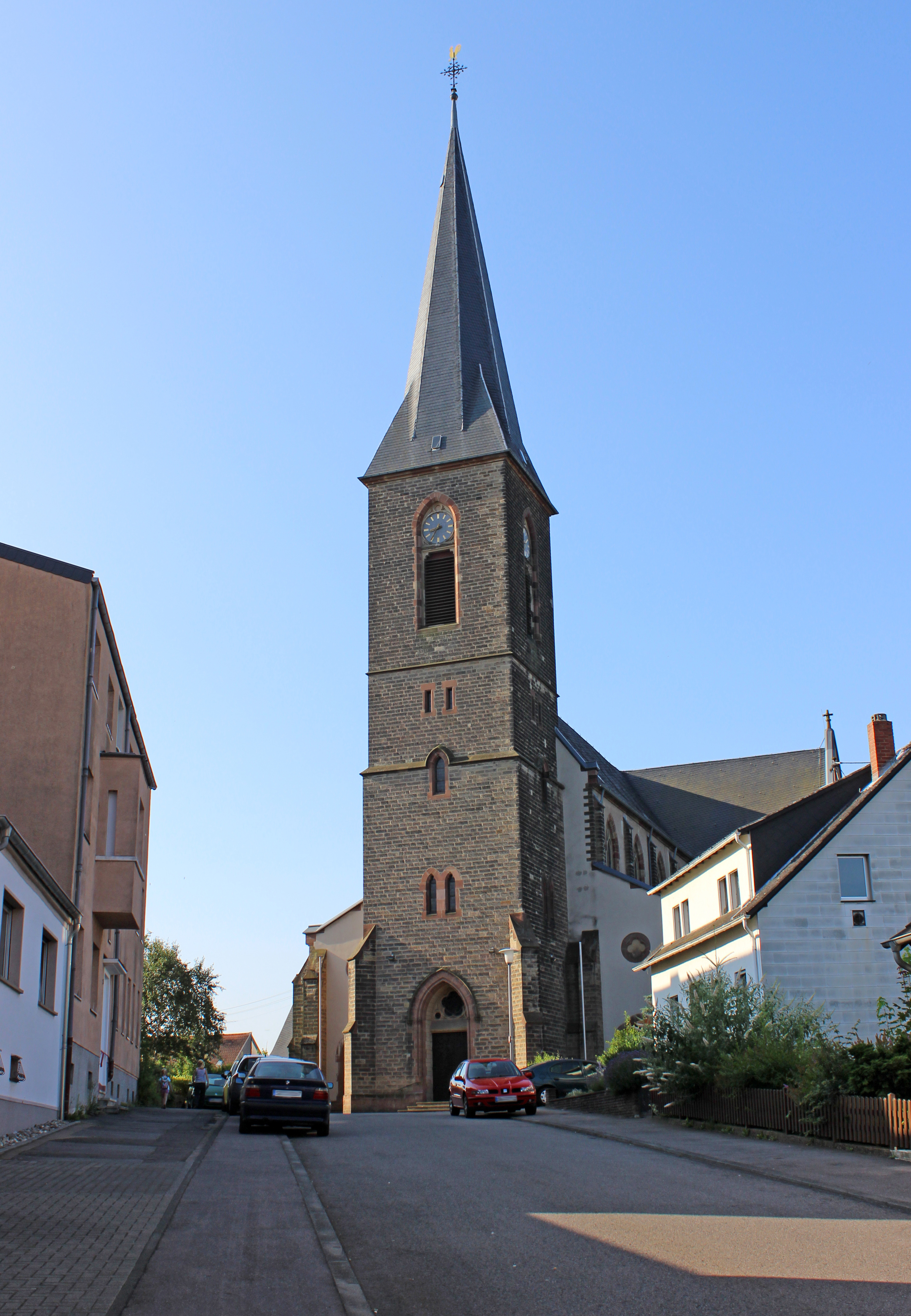 Die katholische Pfarrkirche St. Johannes Baptista in Altenkessel, einem Stadtteil der saarländischen Landeshauptstadt Saarbrücken